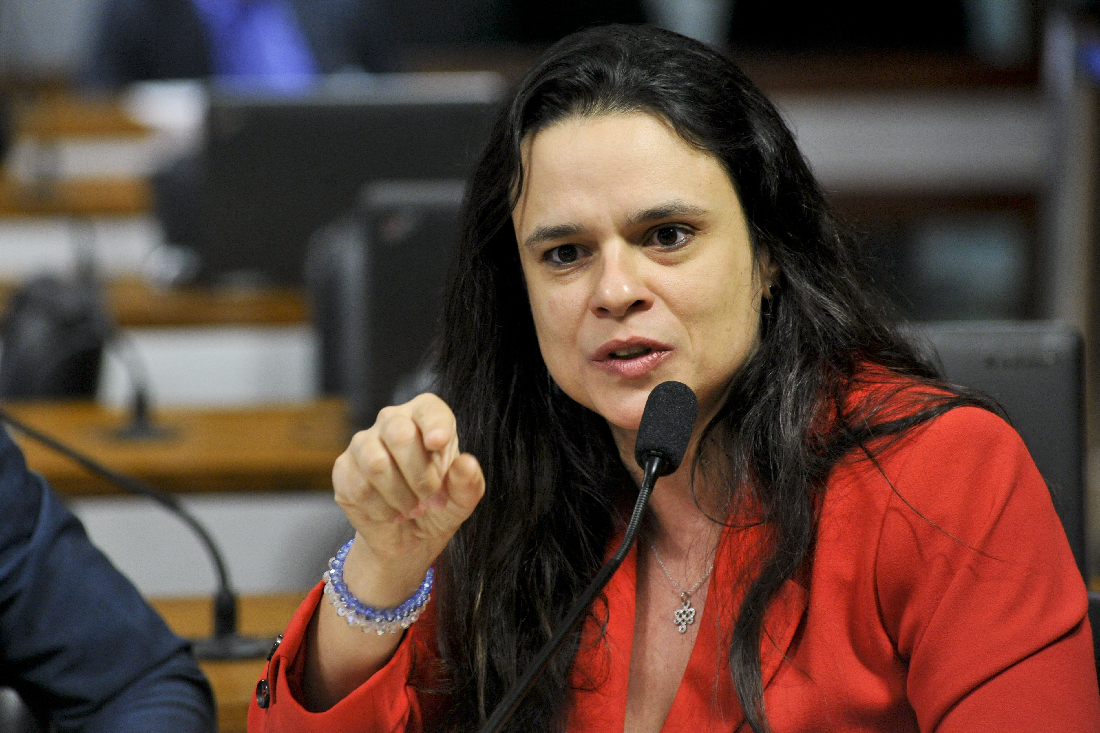 Comissão Especial do Impeachment 2016 (CEI2016) realiza reunião para ouvir testemunhas. Em pronunciamento, jurista Janaína Paschoal Foto: Geraldo Magela/Agência Senado